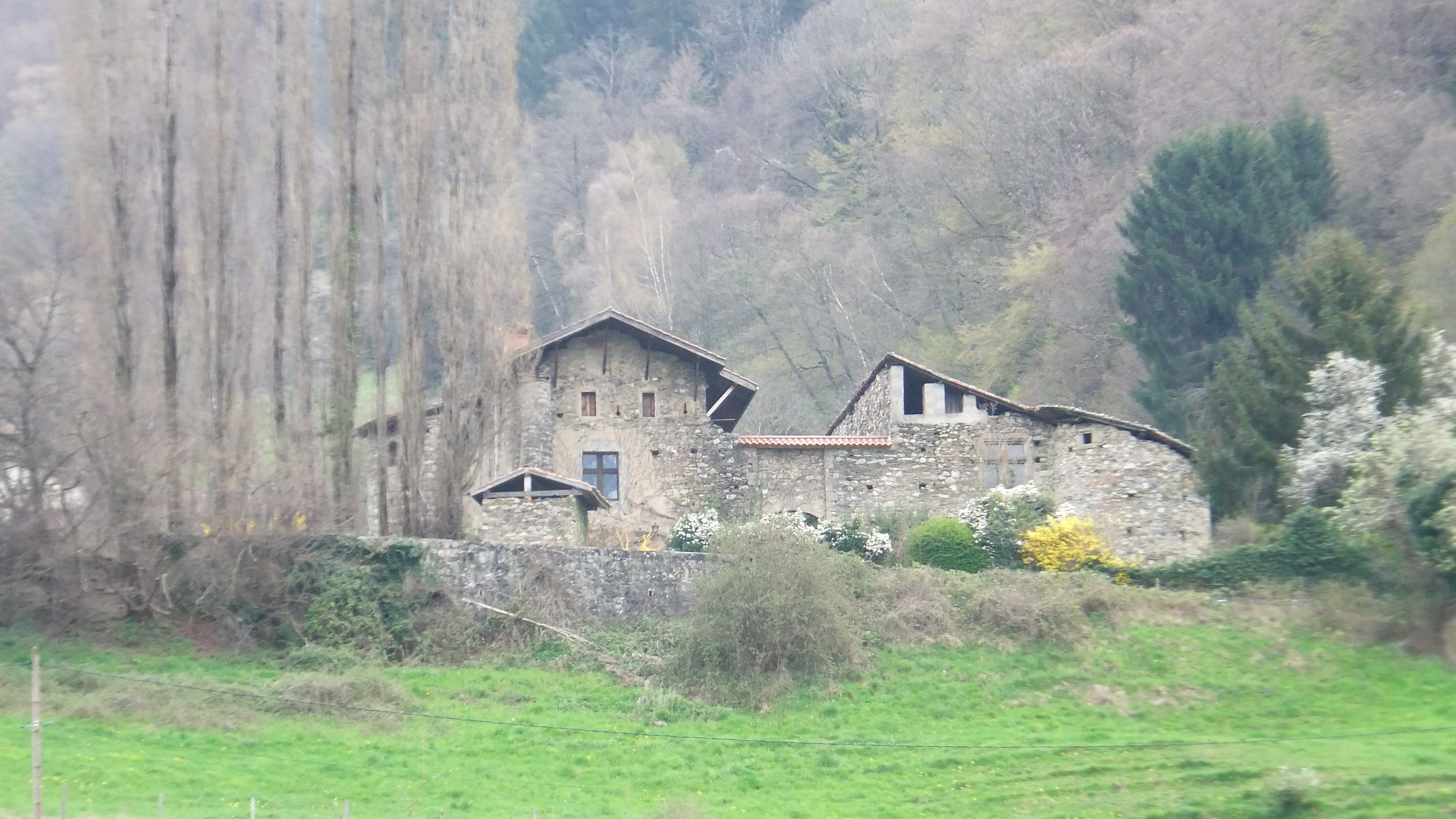 Ancienne maison forte des Guiffrey de Boutières, XVIe siècle. Le chevalier Guigues Guiffrey était lieutenant de Bayard et s'est ensuite illustré à la bataille de Cérisoles, le 11 avril 1544.